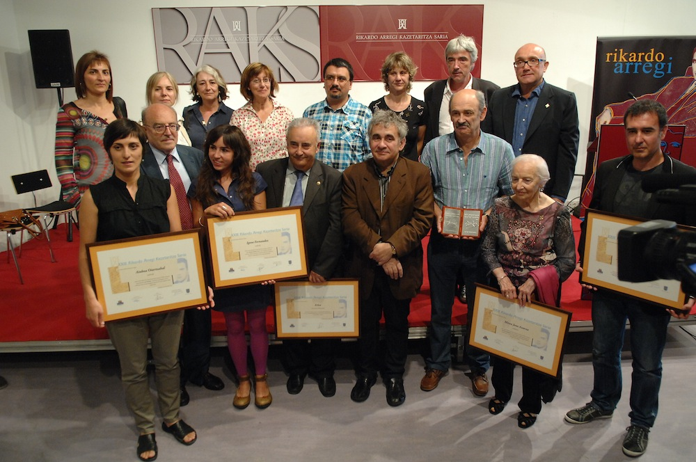 2011ko Rikardo Arregi kazetaritza-saria